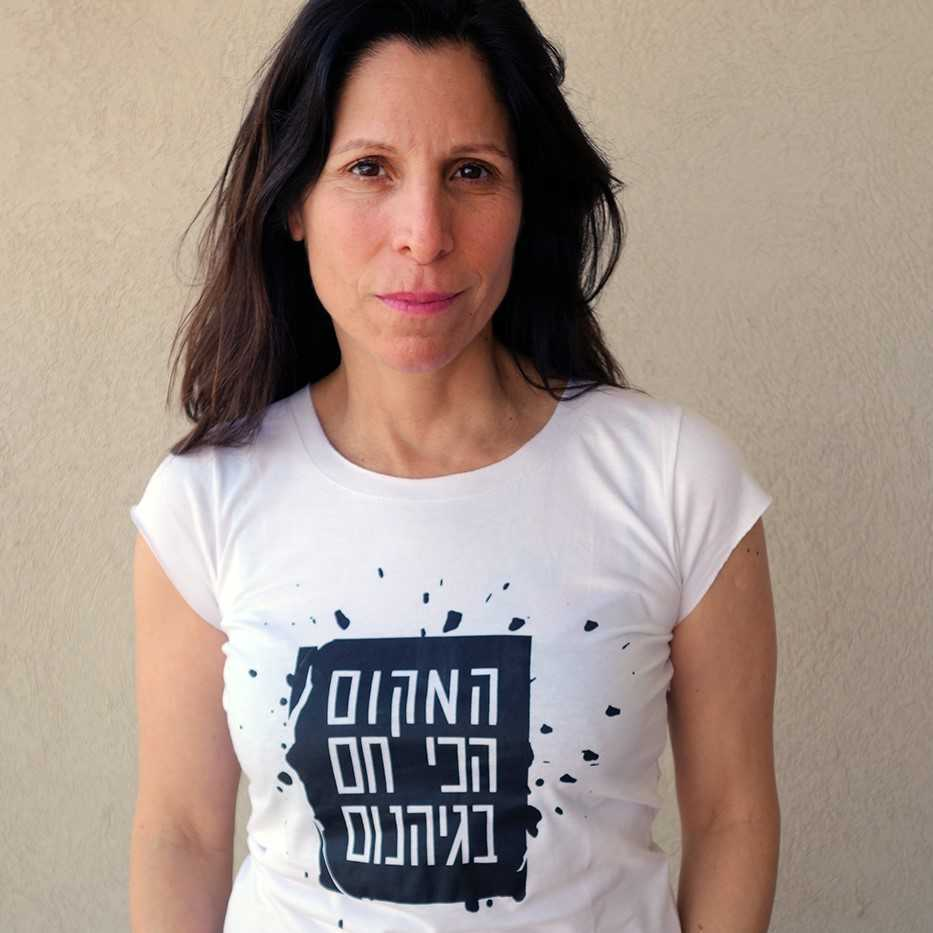 חולצת לוגו המקום הכי חם בגיהנום